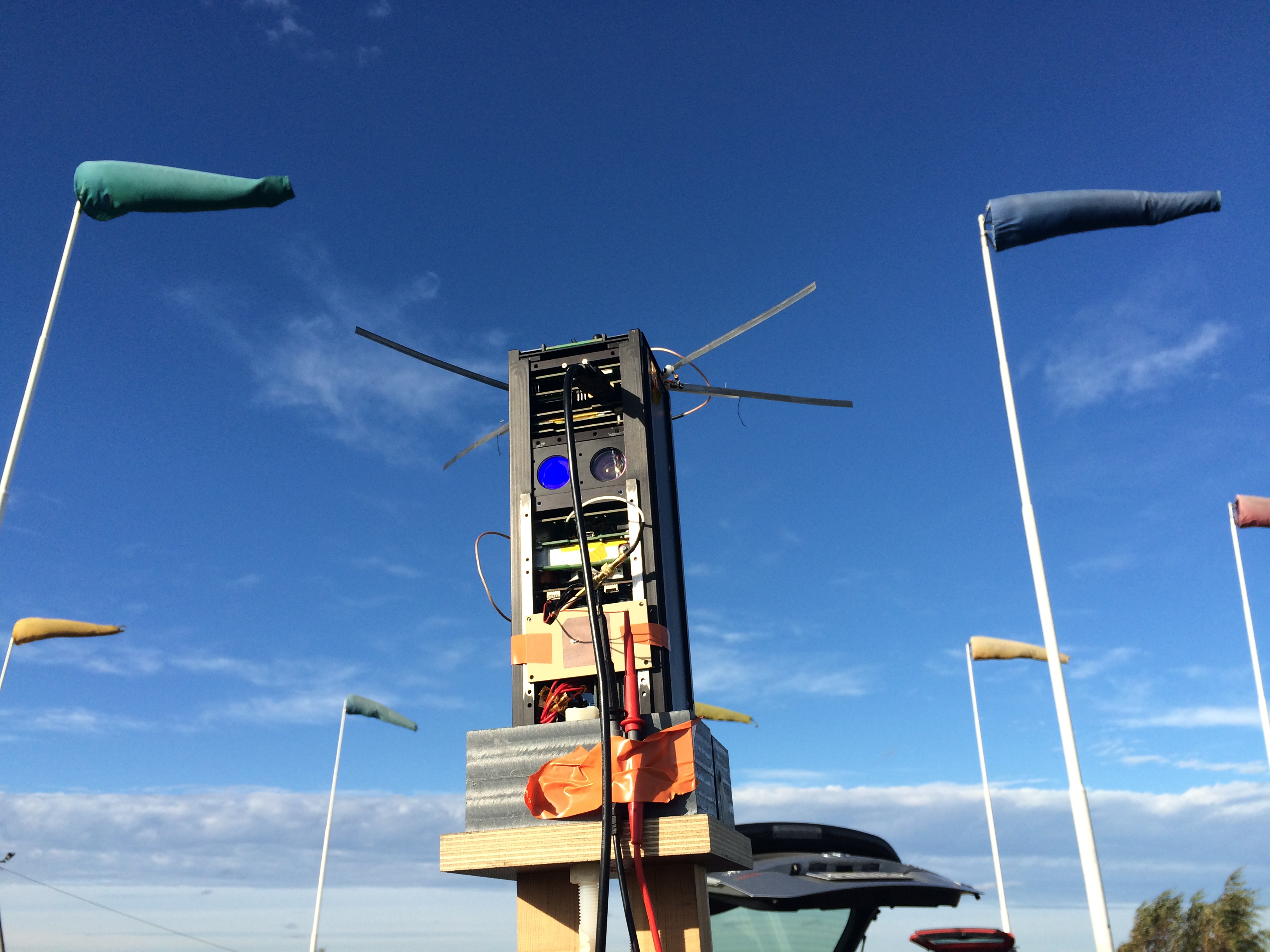 Yhteystesti insinöörimallin ja maa-aseman välillä lokakuussa 2015.